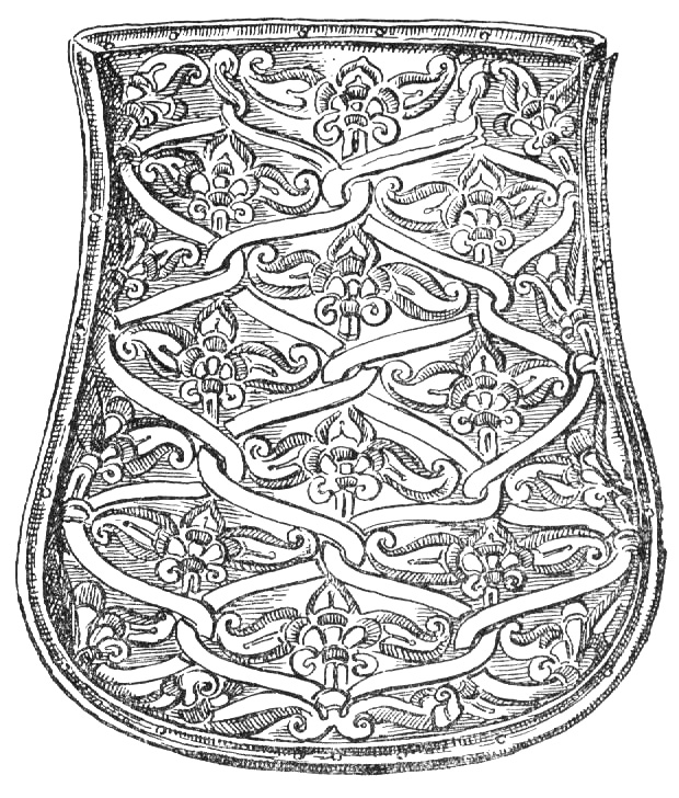 Galgóc (Hlohovec, Sk) tarsolylemez